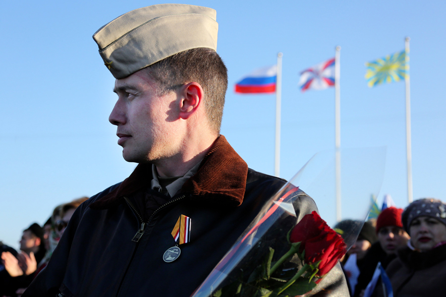 Возвращение российских военных лётчиков с авиабазы Хмеймим в Сирии на авиабазу Приморско-Ахтарск Южного военного округа в Краснодарском крае